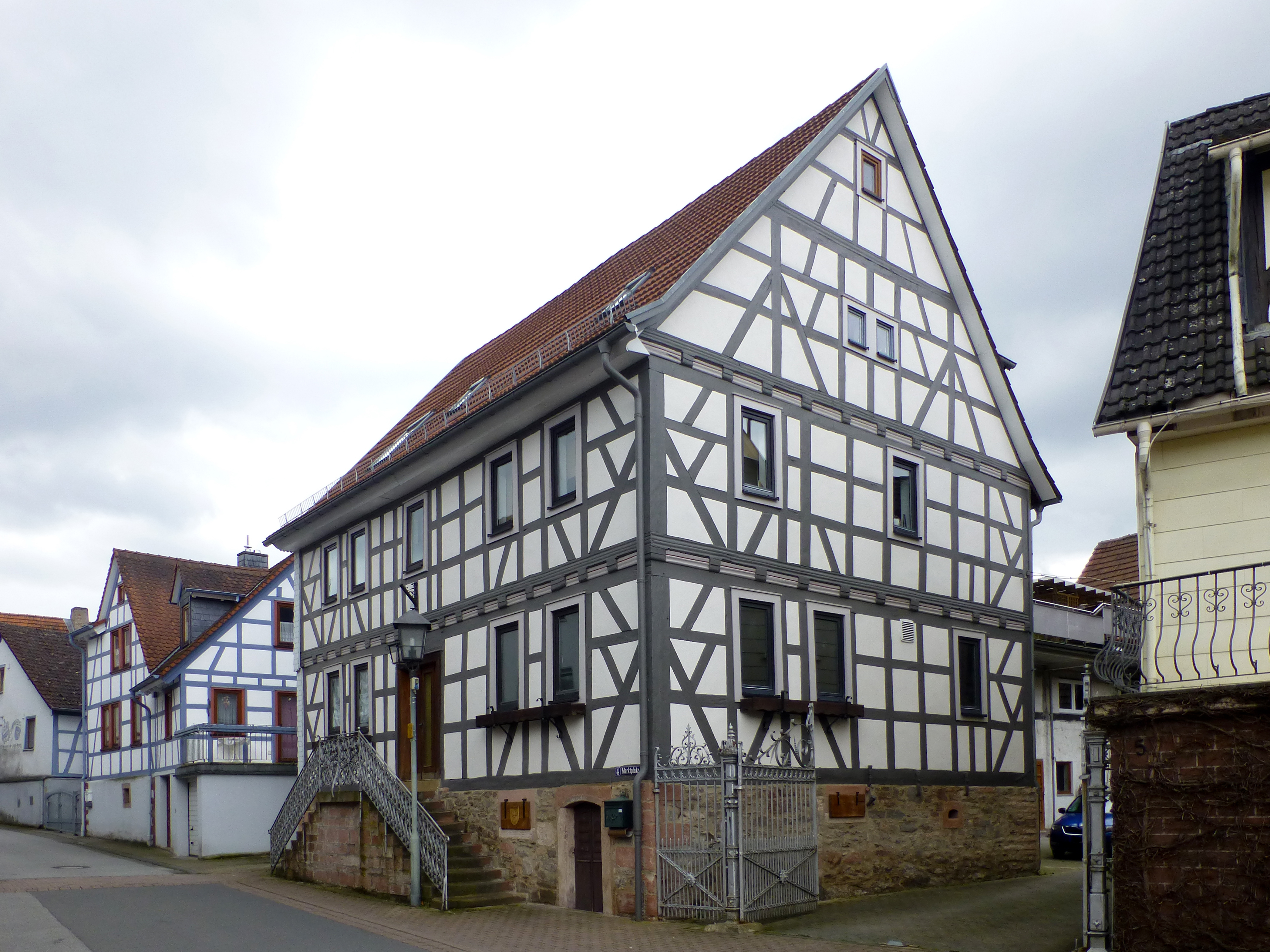 Fachwerkhaus Marktstraße 4 in Pfaffen-Beerfurth; früher Gasthaus 'Zum Goldenen Pflug'